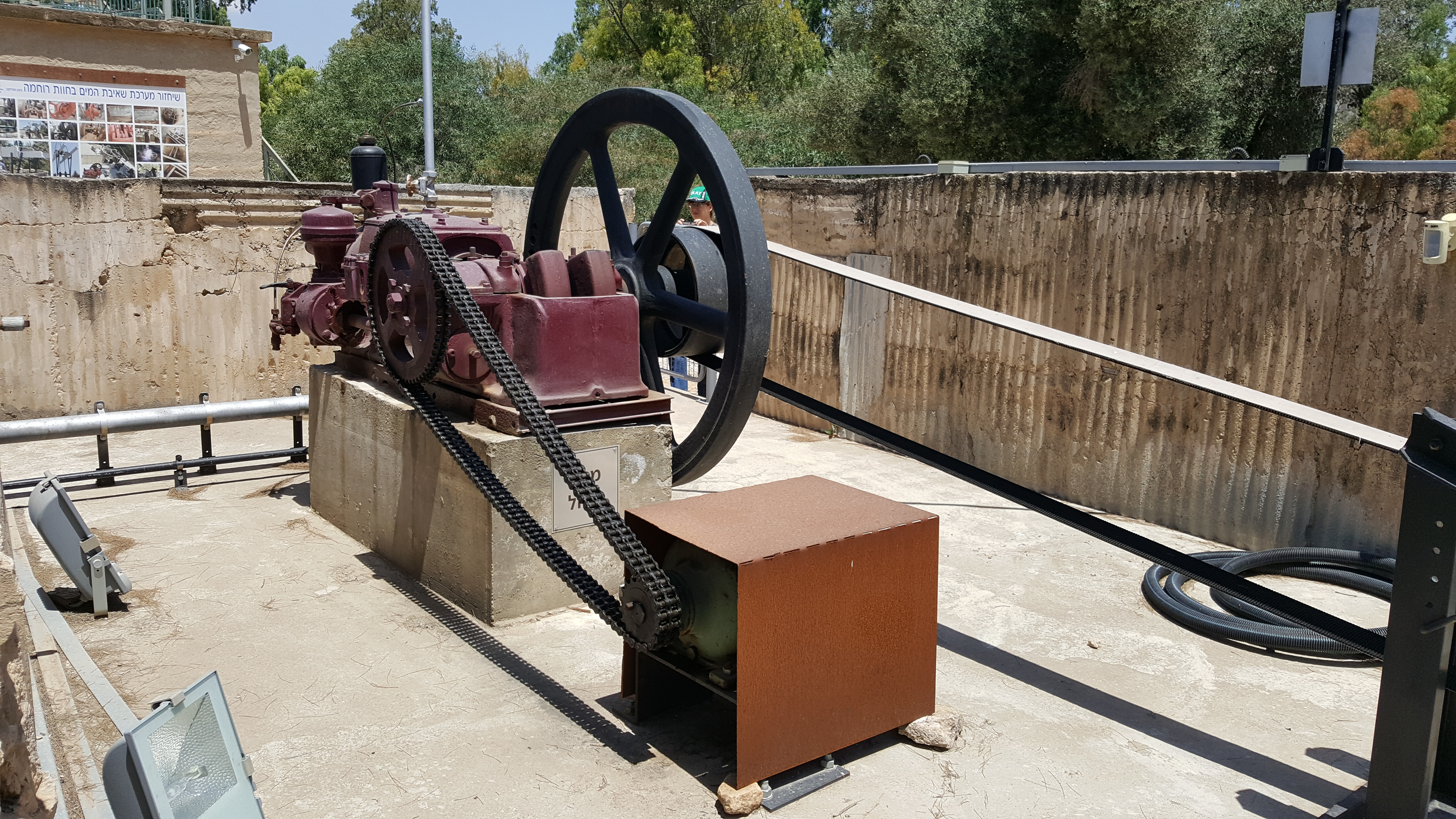 מנסיון ההתיישבות הראשון ברוחמה נותרה רק הבאר שנחפרה בשנת 1913. לידה נמצא בית בטון שנבנה בשנות ה-40 של המאה ה-20 ושימש כבית ביטחון.